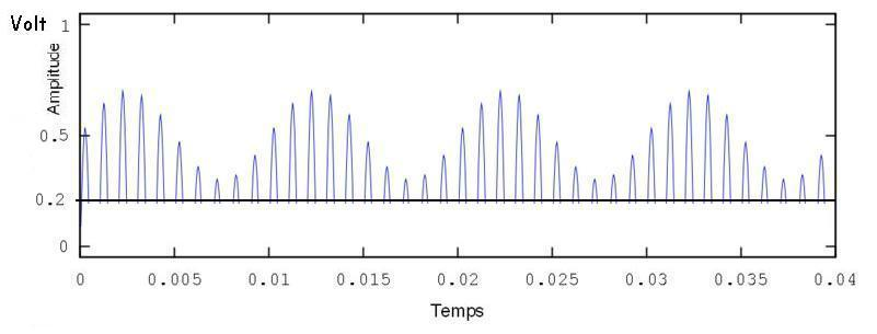 Poste a galène. Cette image représente le signal modulateur celui basse fréquence sans filtrage